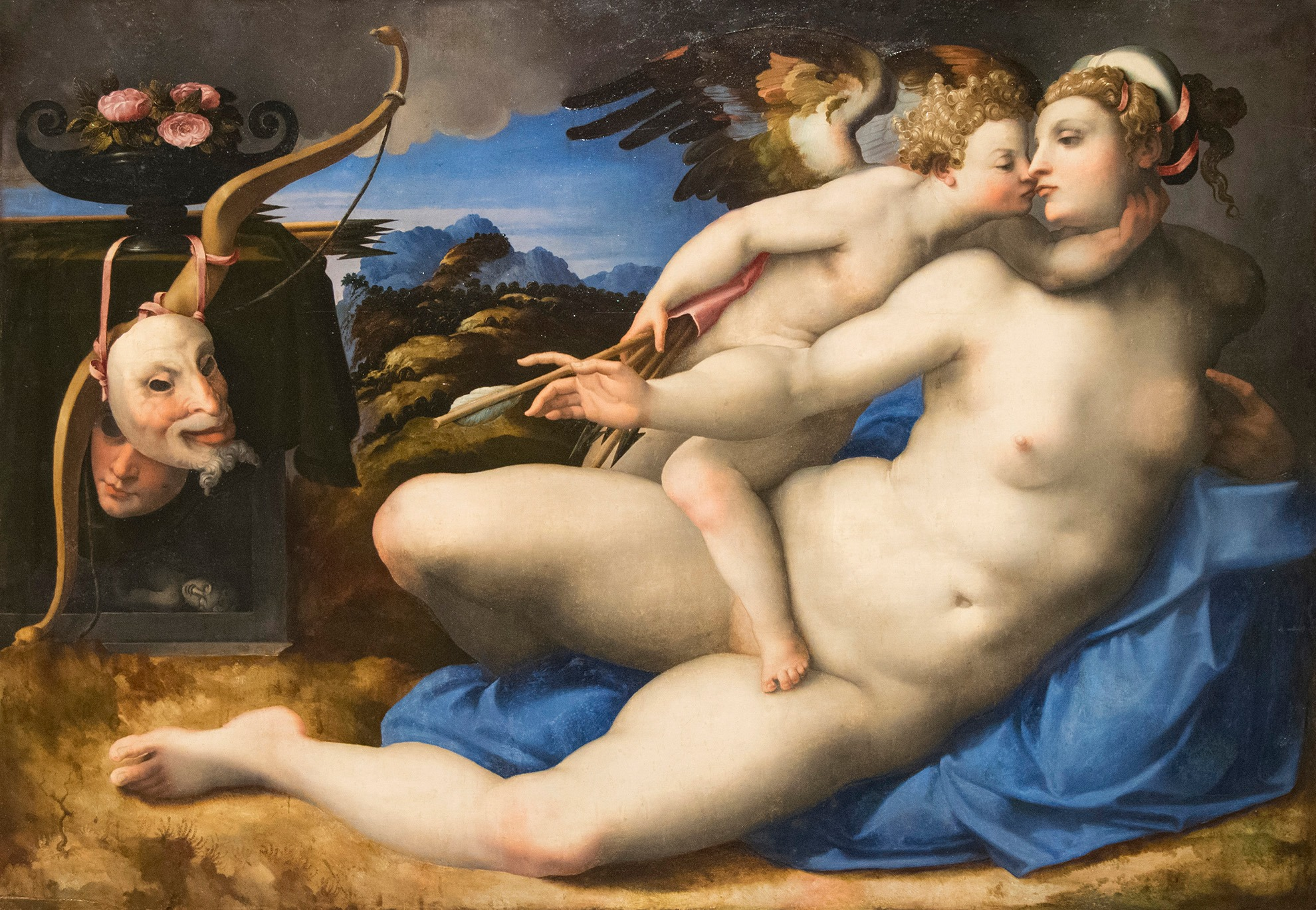 Galleria Farnese (Museuo di Capodimonte)